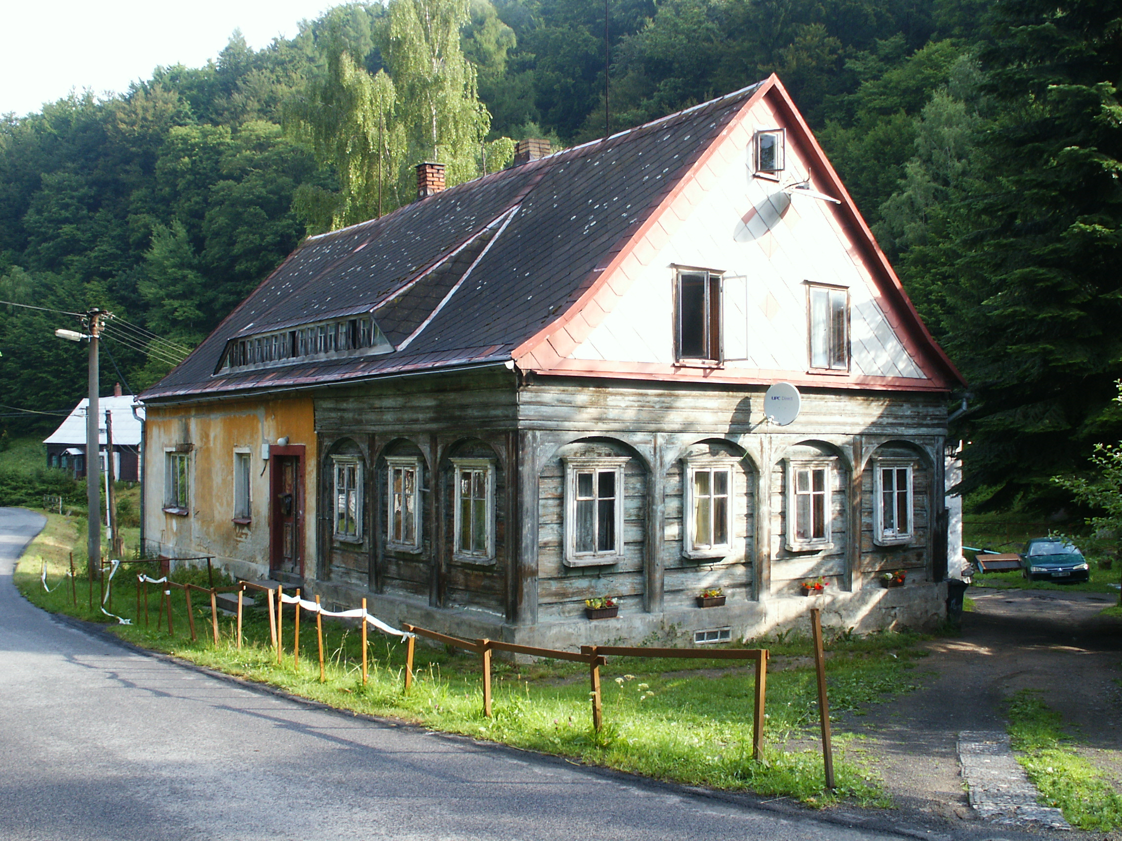 Hely - č.p. 28